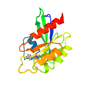 Estructura tridimensional Rab3C